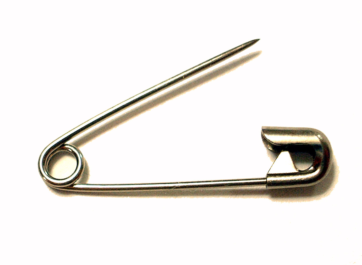 Safety pin, photo taken in Japan